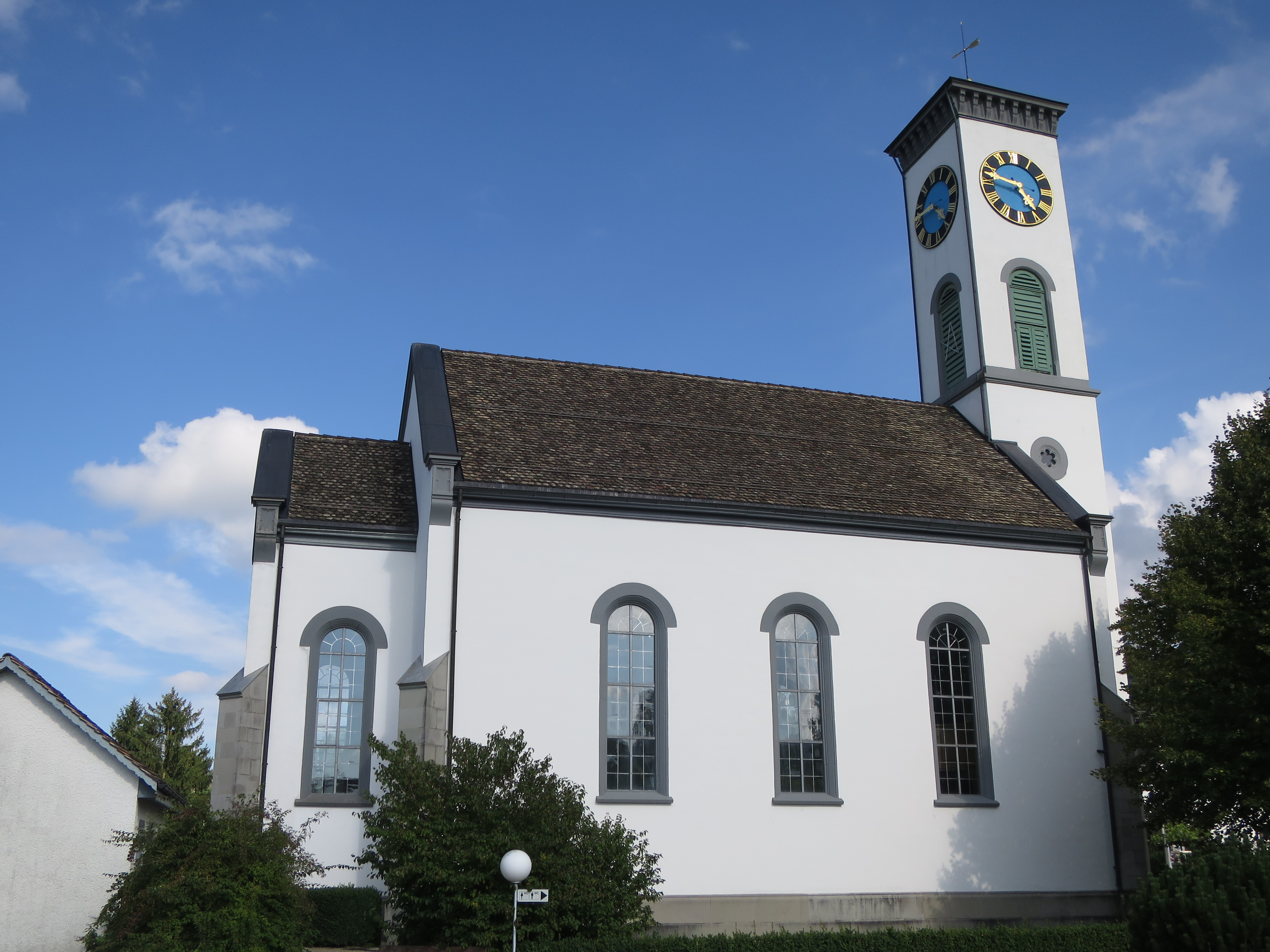 Huetten ZH - Reformierte Kirche von aussen